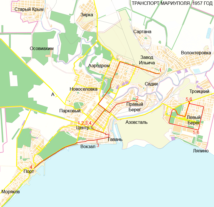 Mariupol transport map map